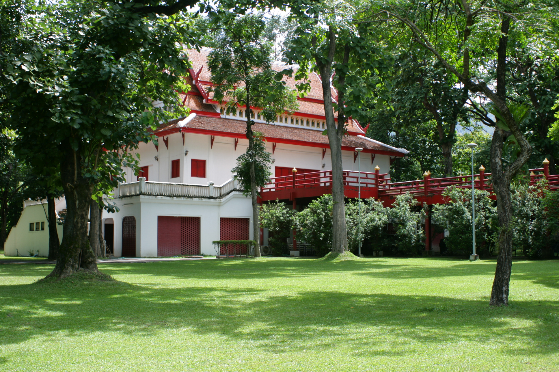 Sala Thum at CMU (ศาลาธรรม มหาวิทยาลัยเชียงใหม่)